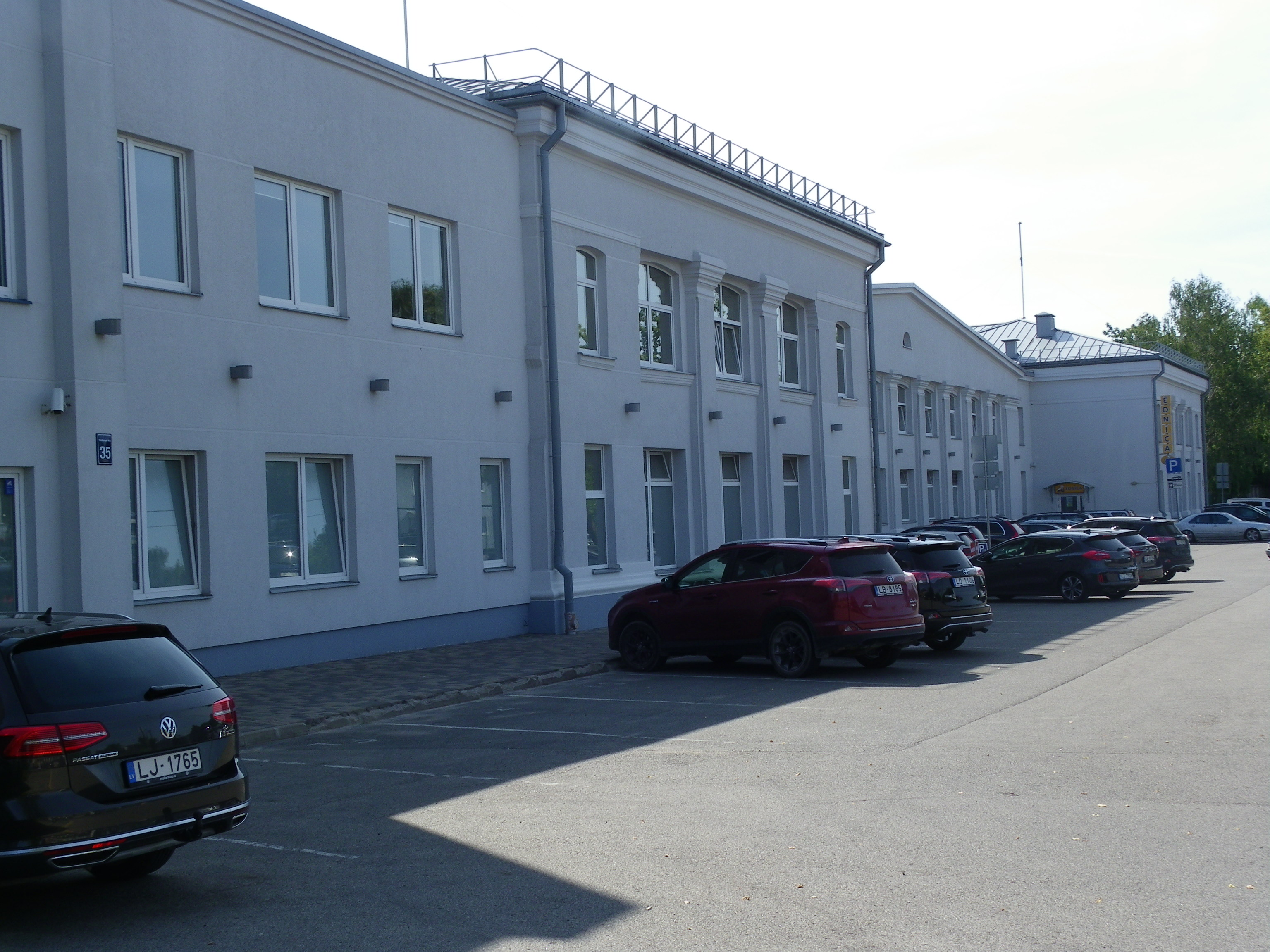 Vestienas iela Rīgā